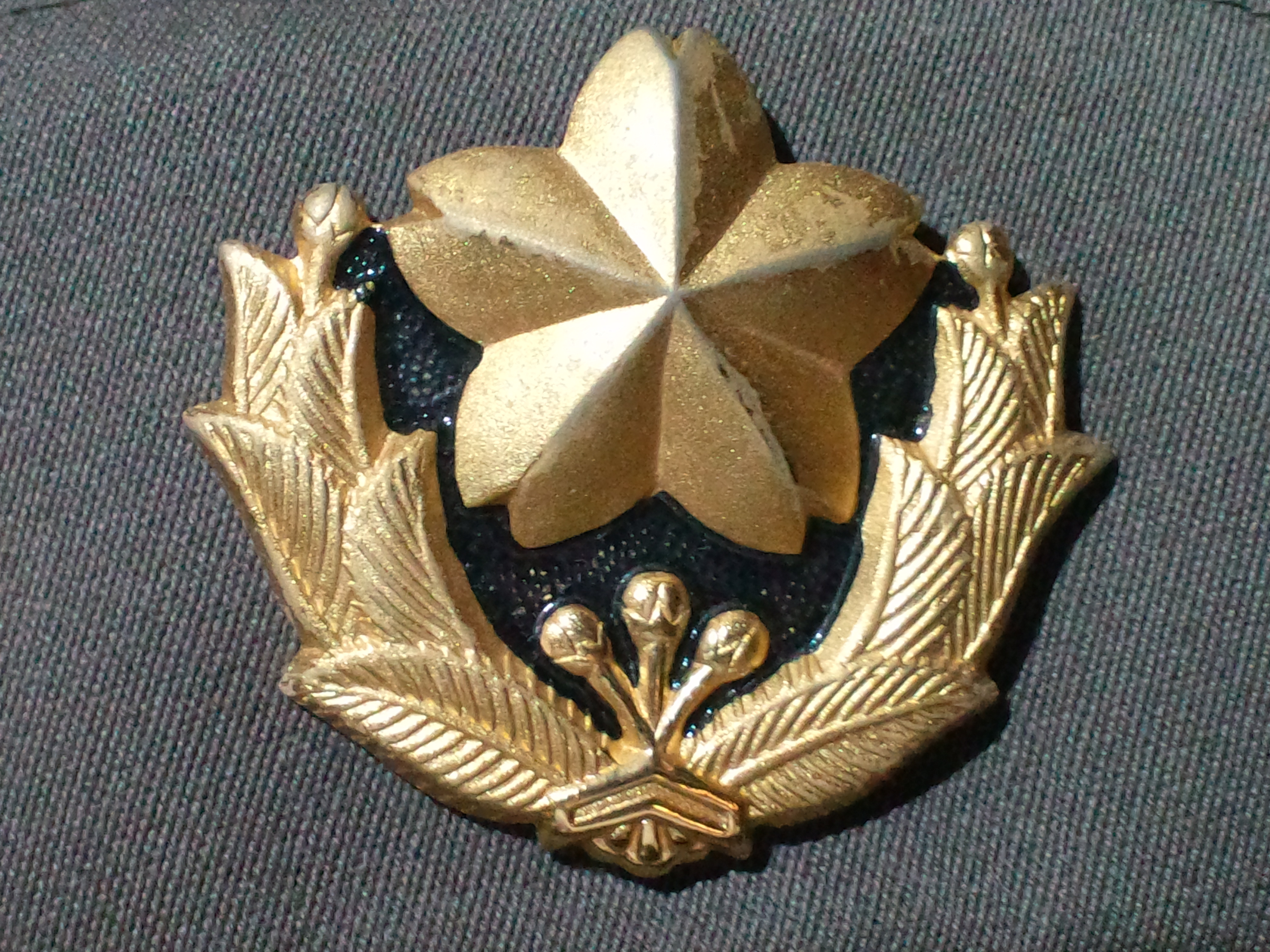 70式陸上自衛隊正帽章